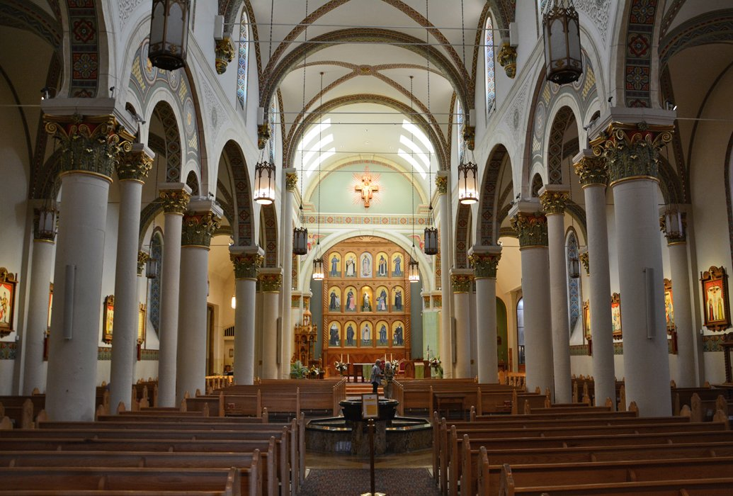 Santa Fé, New Mexico, Kathedrale